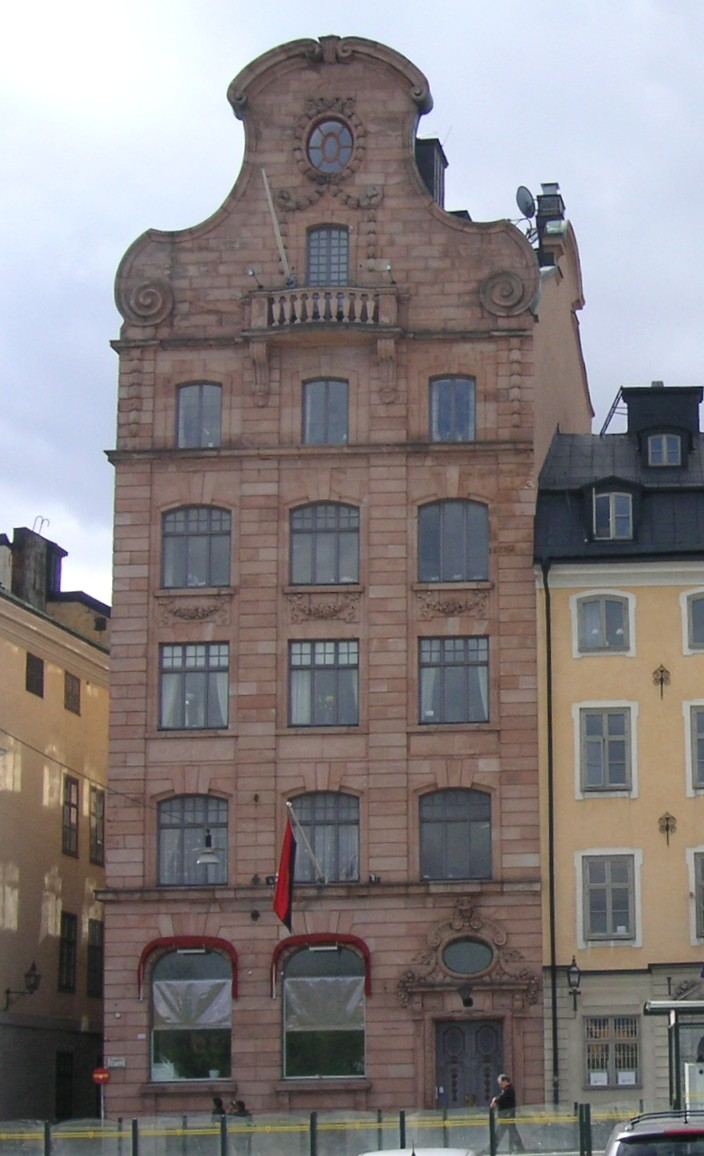 Skeppsbron nr 8, Stockholm